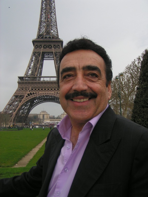 Hakkı Bulut'un Paris ziyaretinde çektirdiği bir fotoğraf